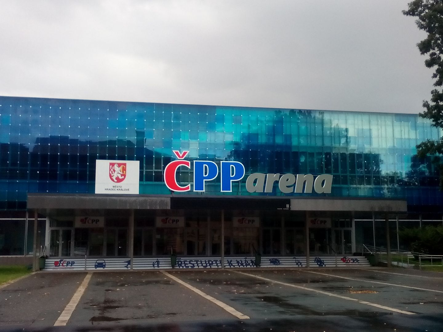 Hokejový stadion Hradce Králové